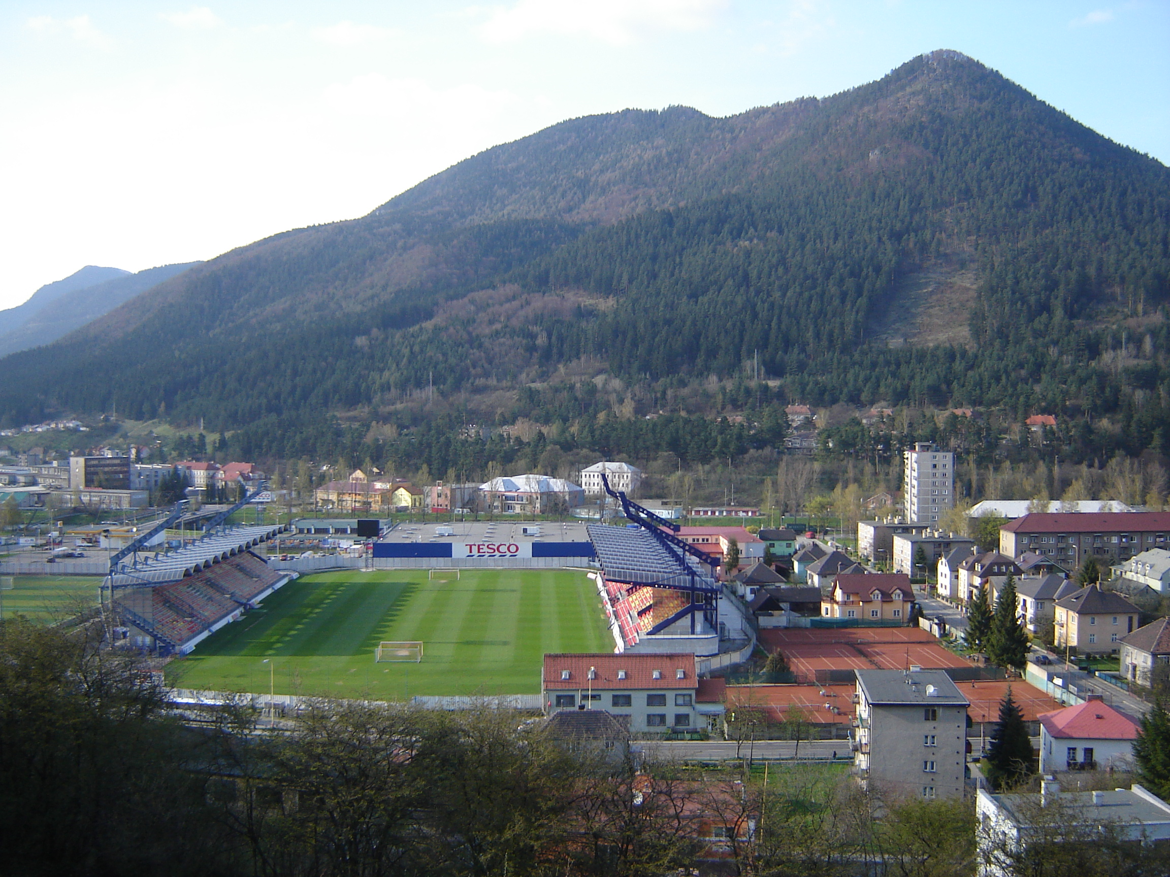 Futball stadium Ružomberok